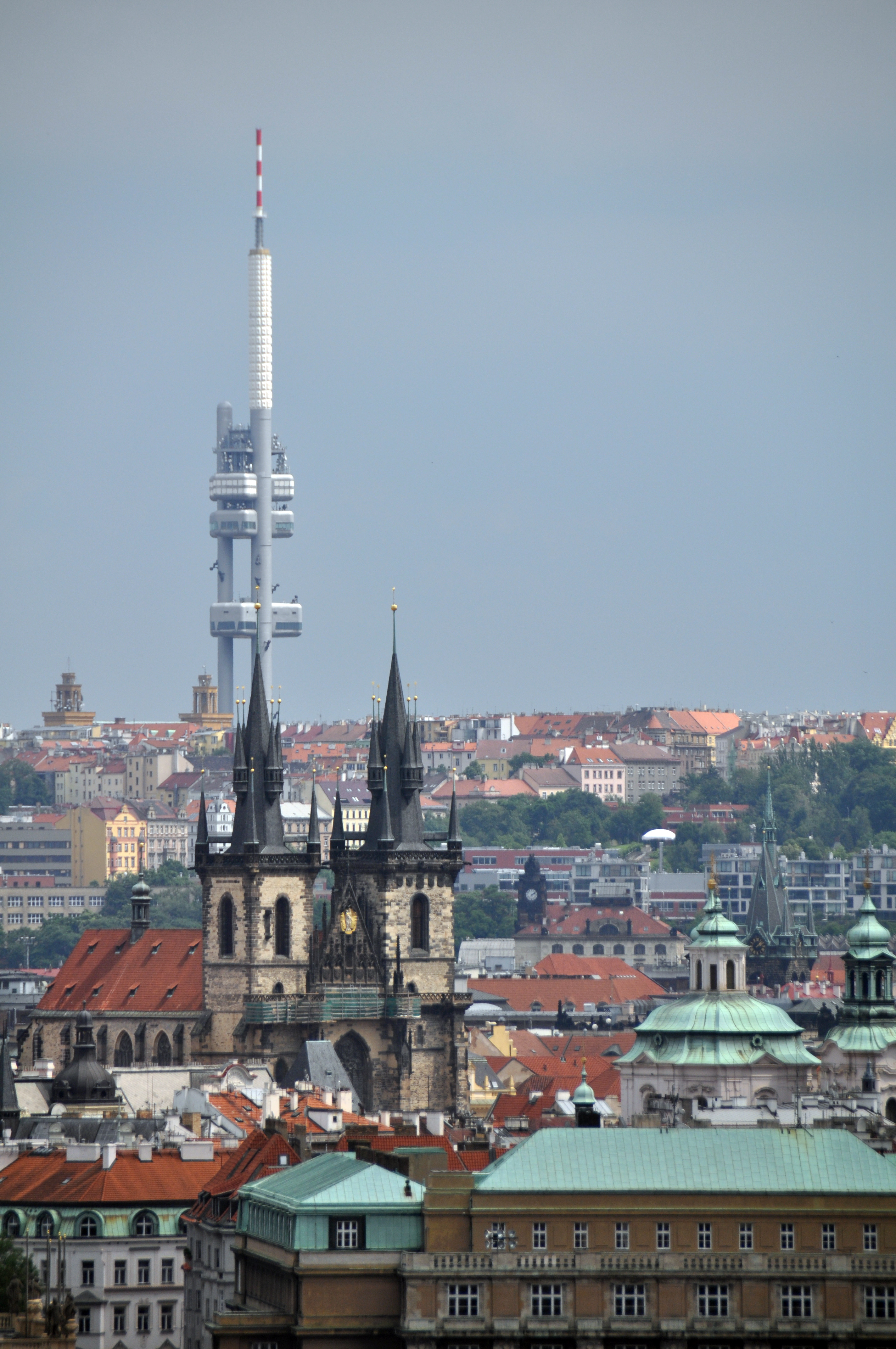 Prag